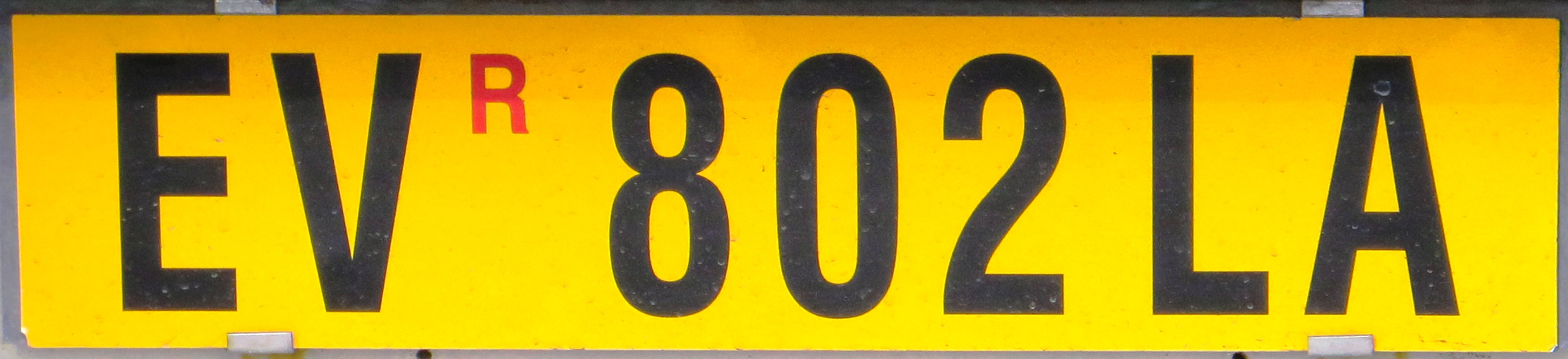 trailer plaat